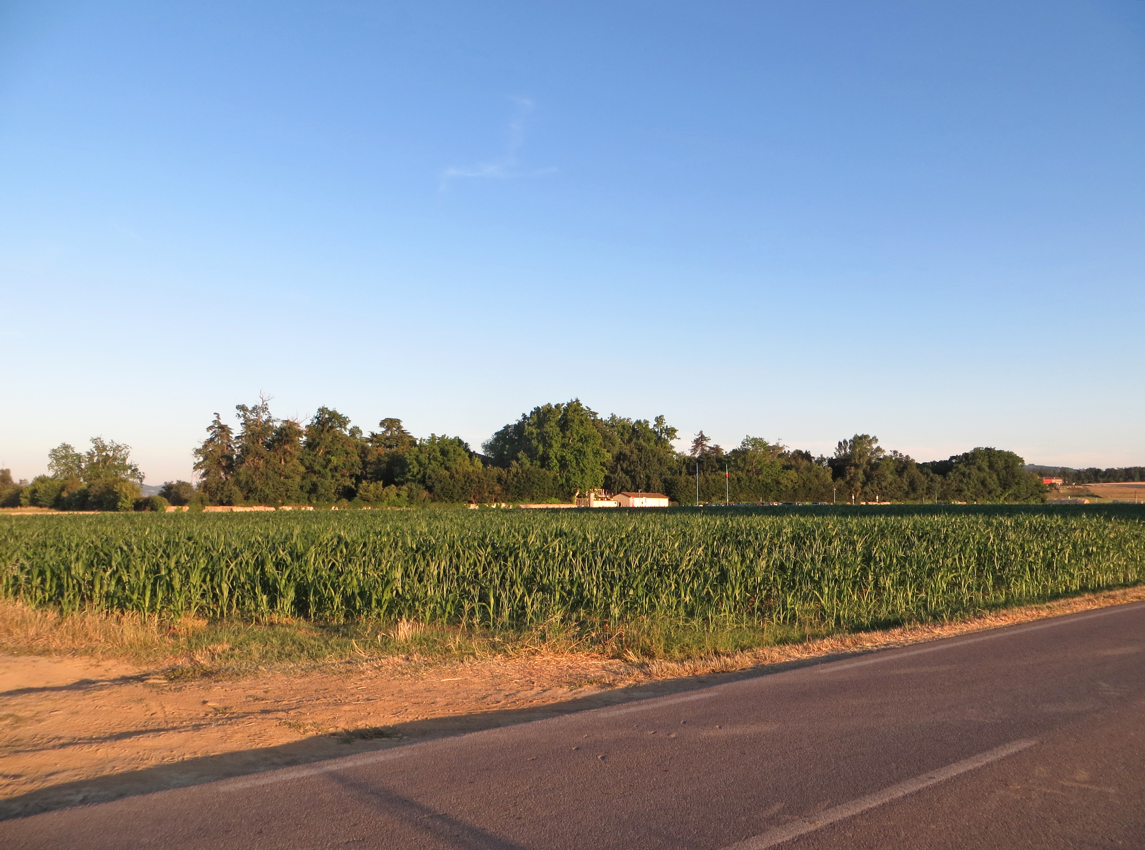 Villa Magnani (Mamiano) - panorama del parco